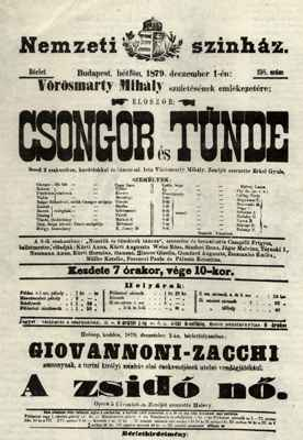 A Csongor és Tünde ősbemutatójának plakátja.